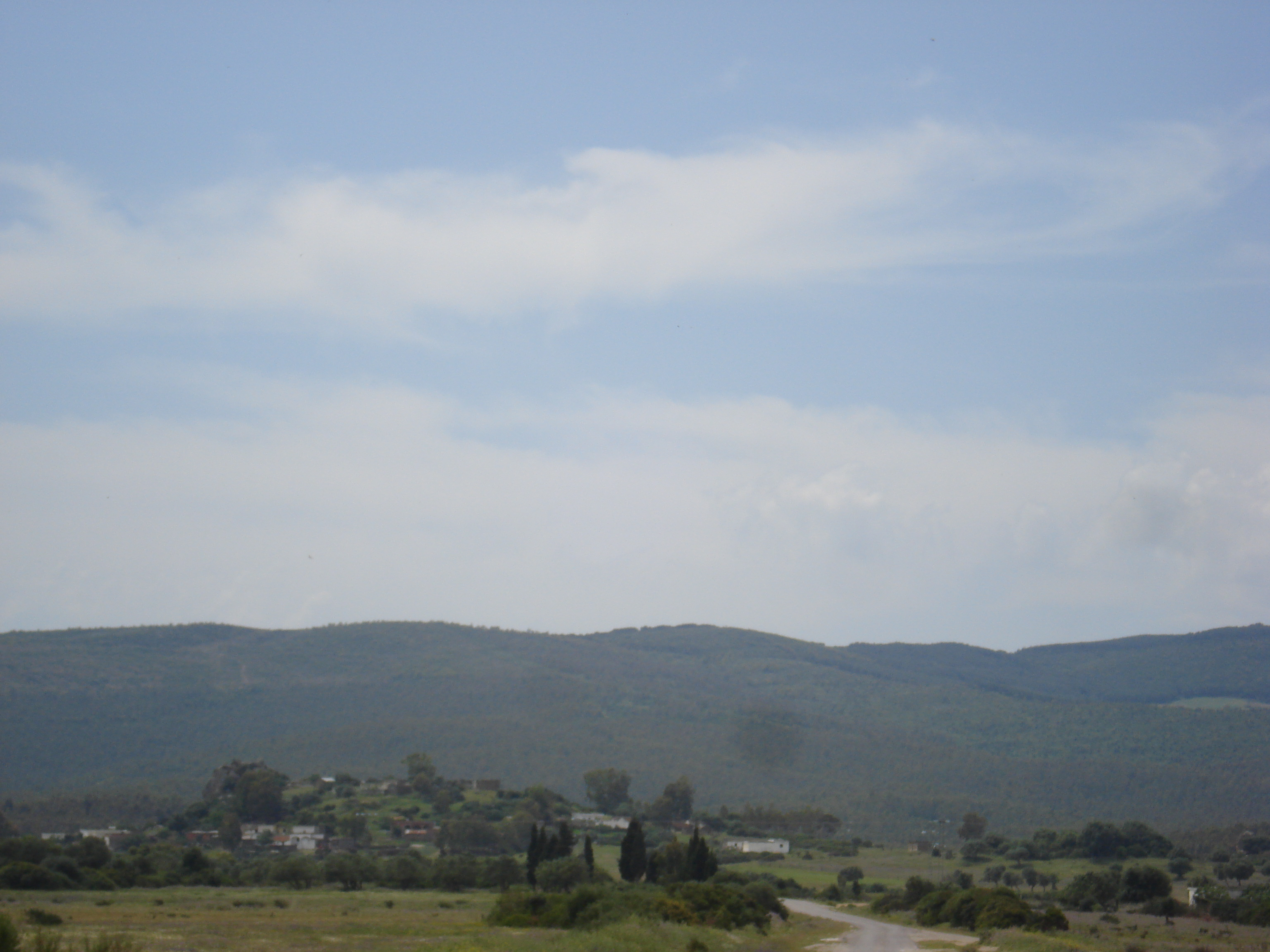 Village "Chaâbet El Hout شعبة الحوت" sur la Route Régionale n°58, Délégation de Sejnane, Gouvernerat de Bizerte, Tunisie